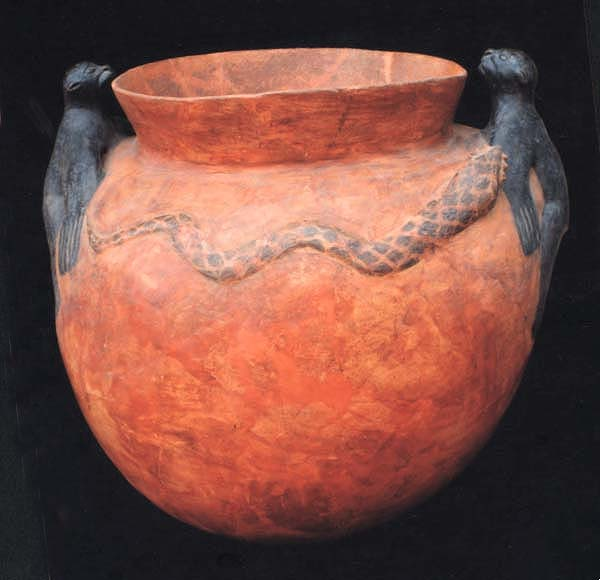 Vasija ceremonial de Huaca Pucllana.